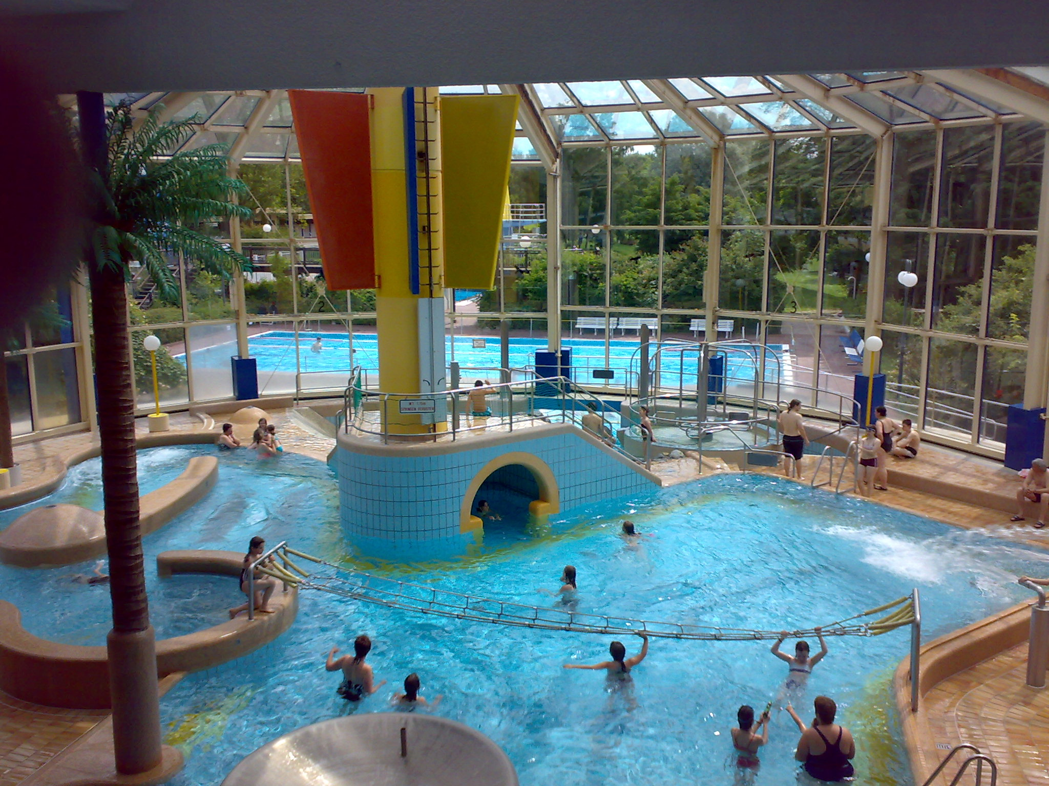 Bad Homburg vor der Höhe, Seedammbad, Abenteuerbecken, geschlossen